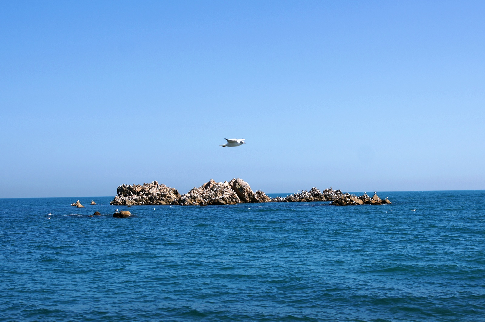 문무대왕릉